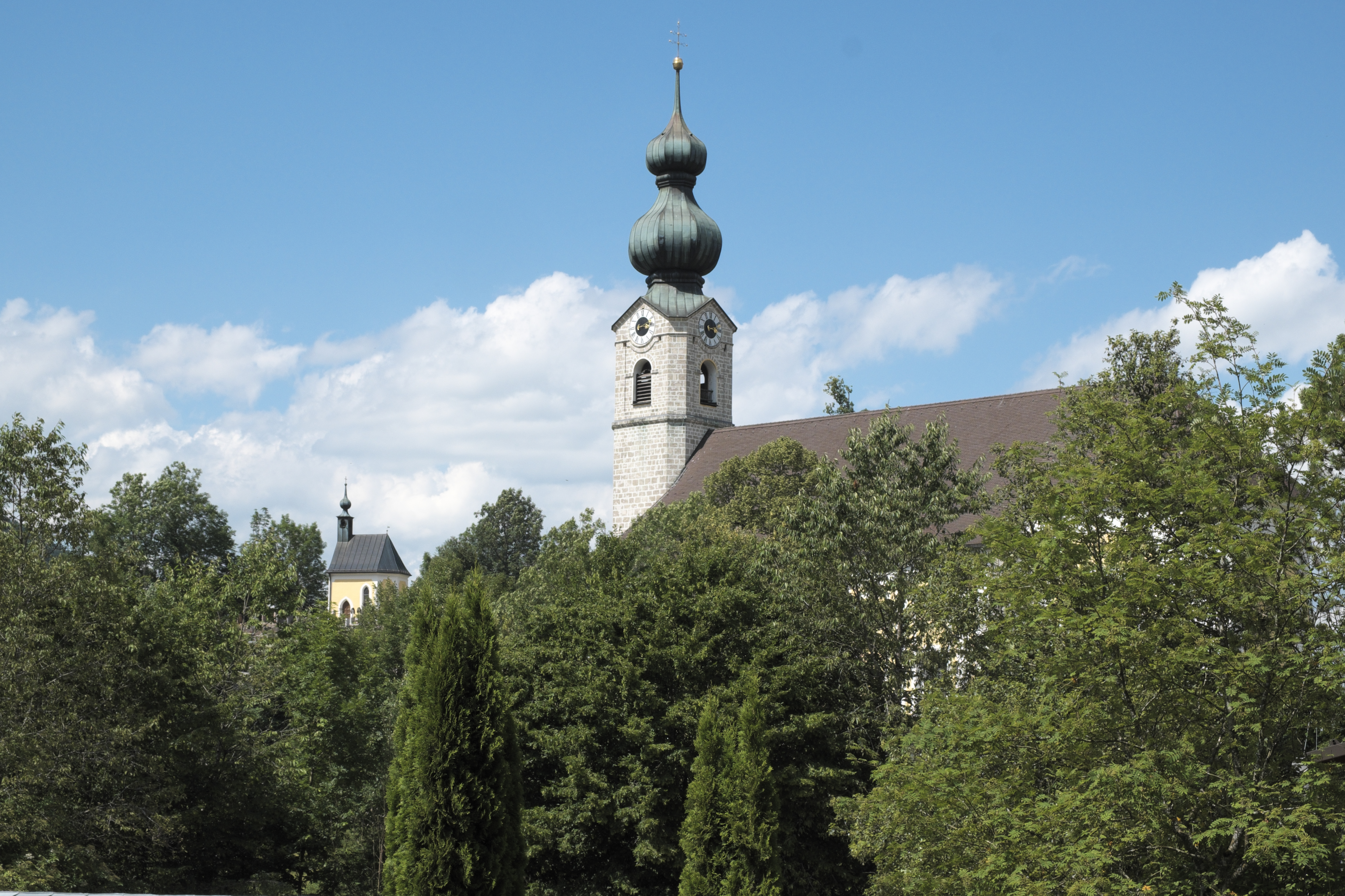 Katholische Pfarrkirche St. Georg, im Hintergrund die Friedhofskapelle, auch Gruftkapelle, in Ruhpolding im Landkreis Traunstein (Bayern/Deutschland)